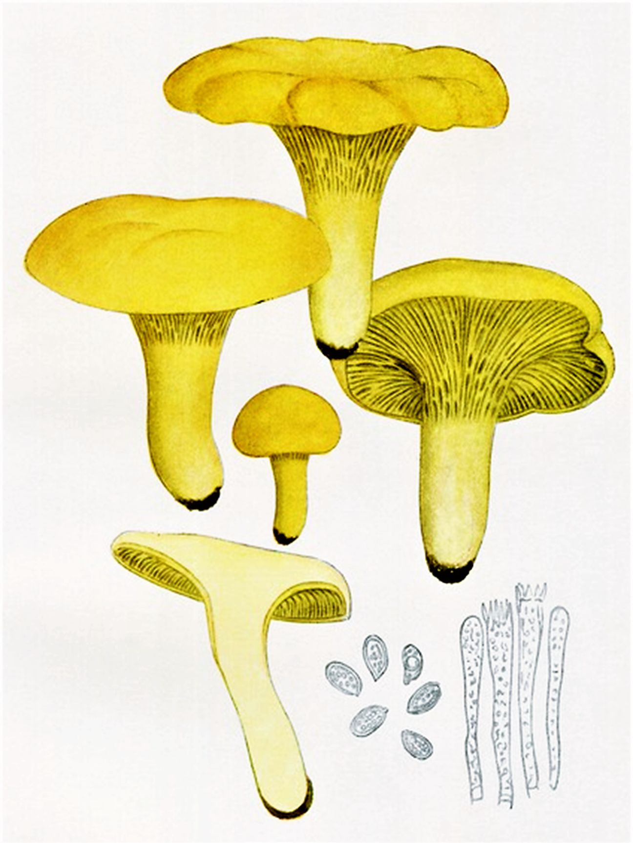 Giacomo Bresadola: Cantharellus cibarius Fr. (1821)